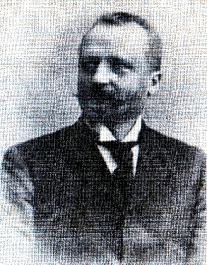 k. u. k. Reichsratsabgeordneter Freiherr Ferdinand Karl Borromäus Putz von Rolsberg 1899